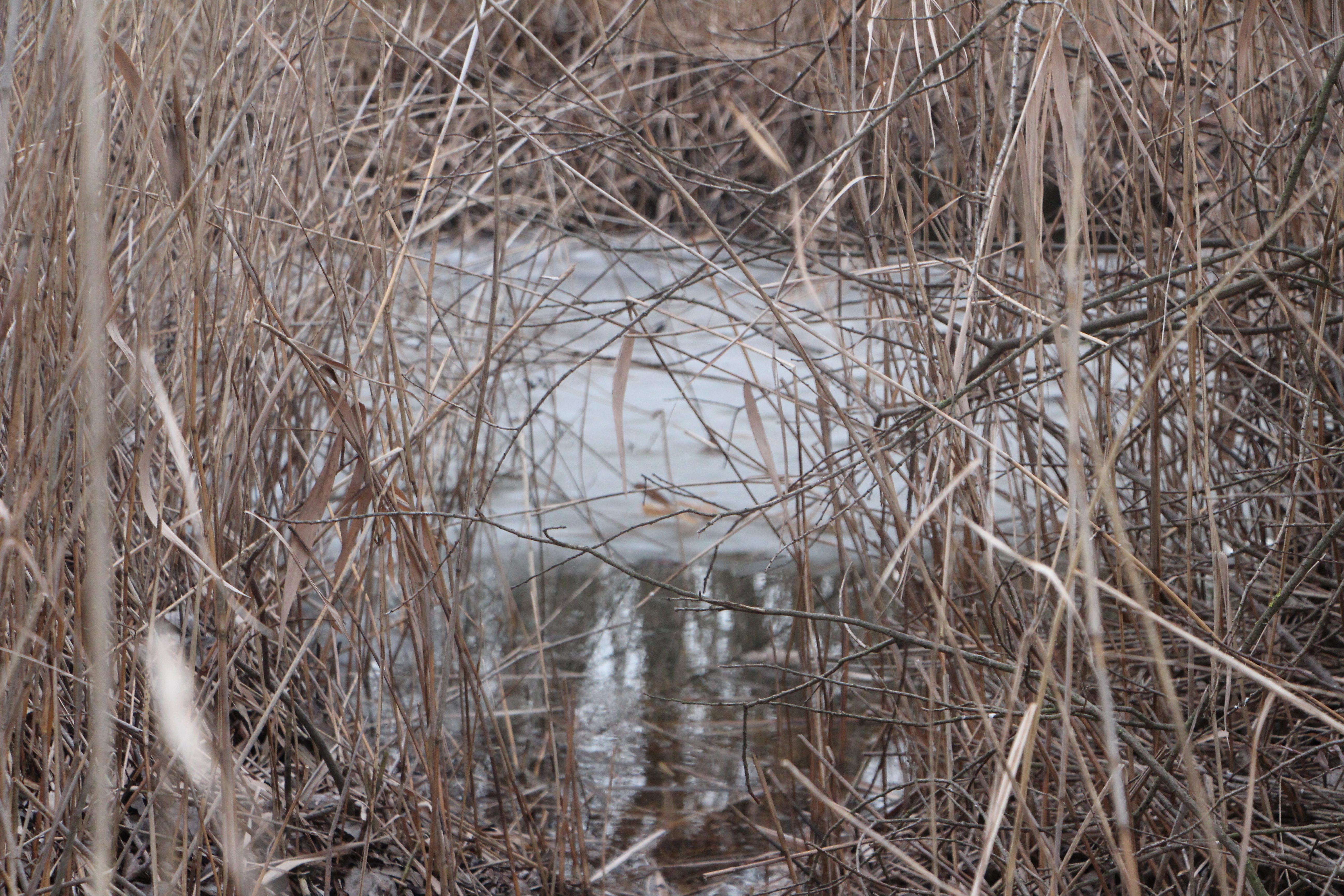 Husí kanál ústie